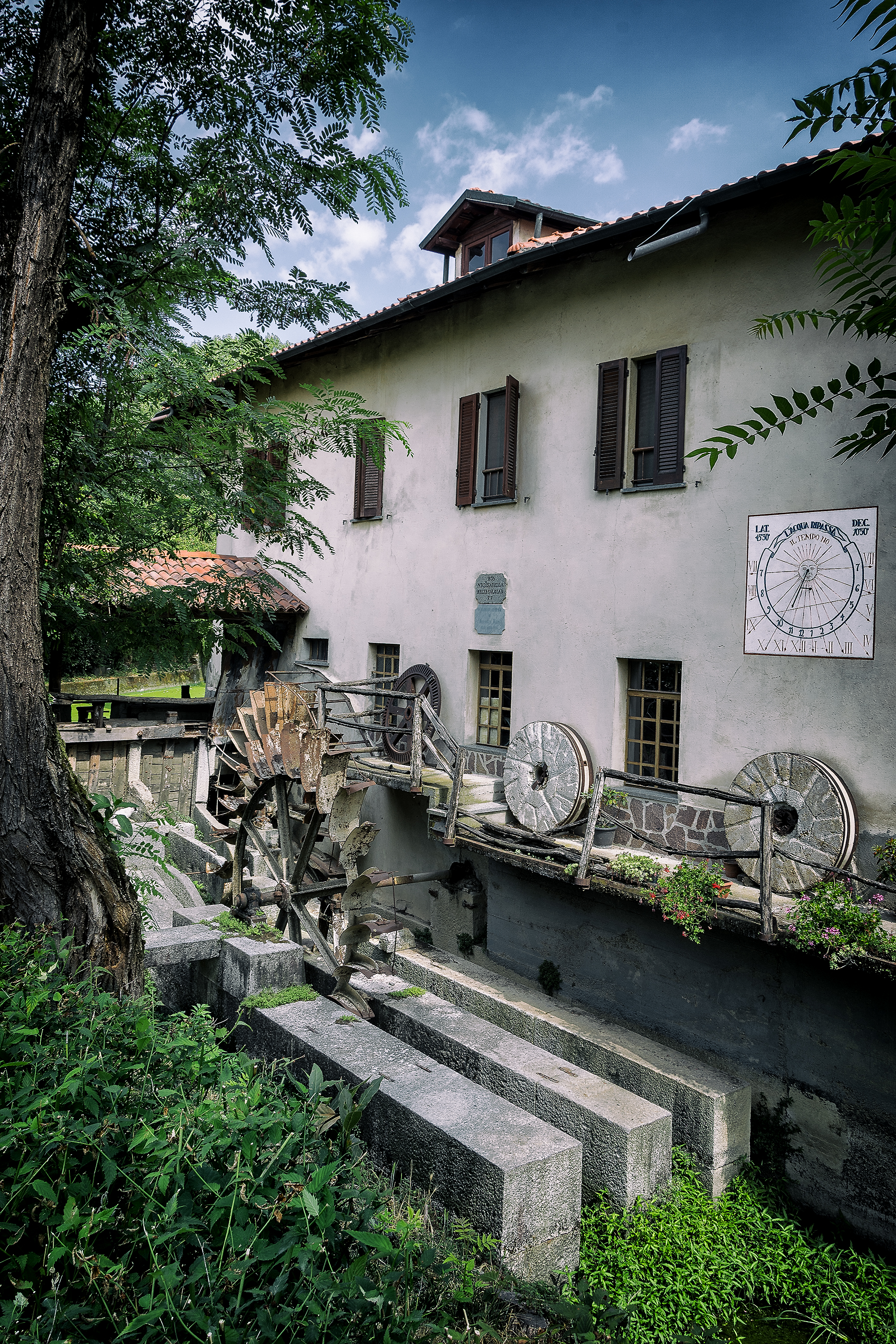 Q29886102 This is a photo of a monument which is part of cultural heritage of Italy.